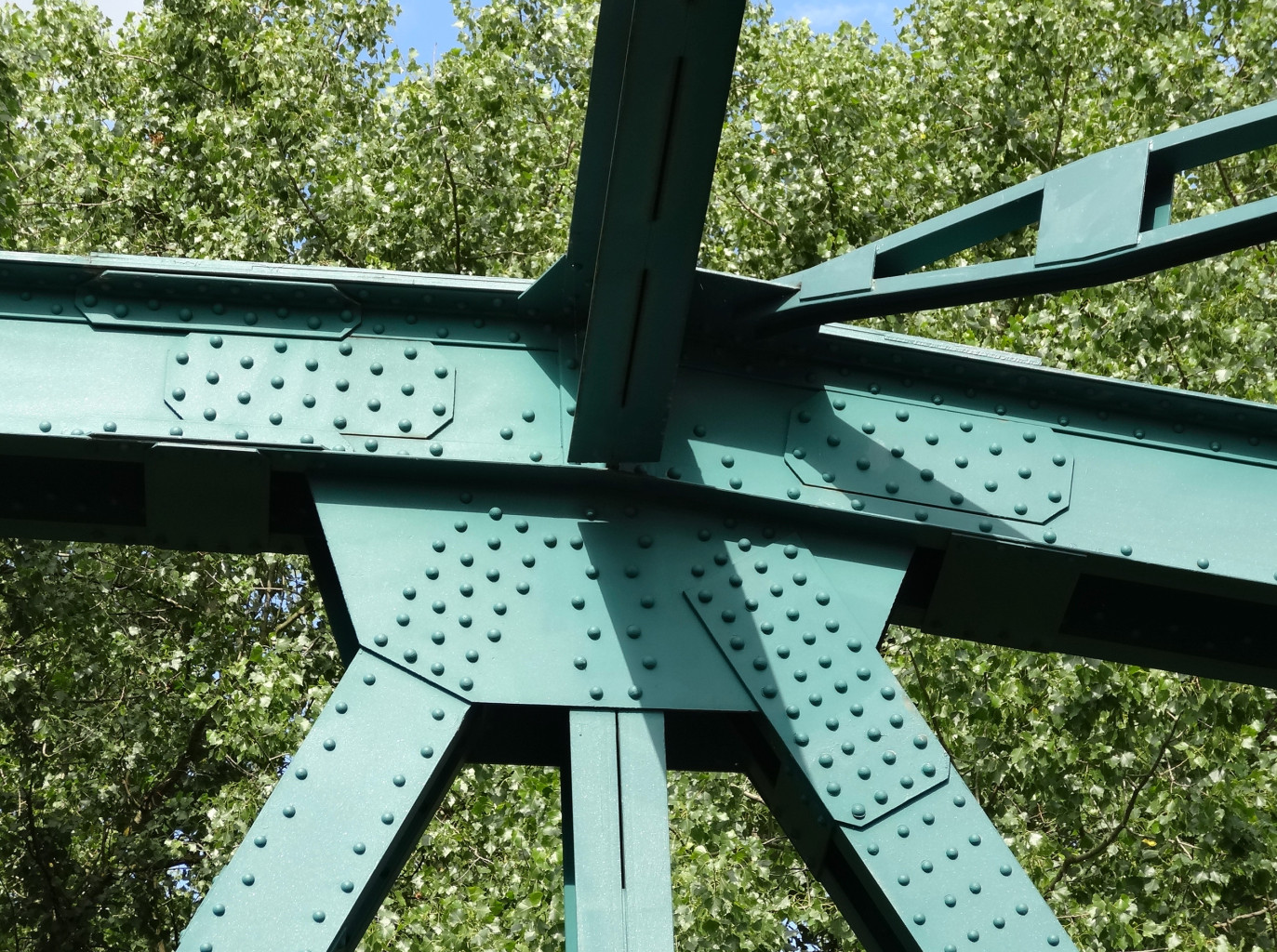 Most fordoński im. Rudolfa Modrzejewskiego nad Wisłą w Bydgoszczy-Fordonie